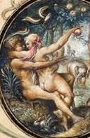 Obraz nacházející se v soukromé sbírce (ČR) čerpá ze stejnojmenné kresby Bartholomea Sprangera